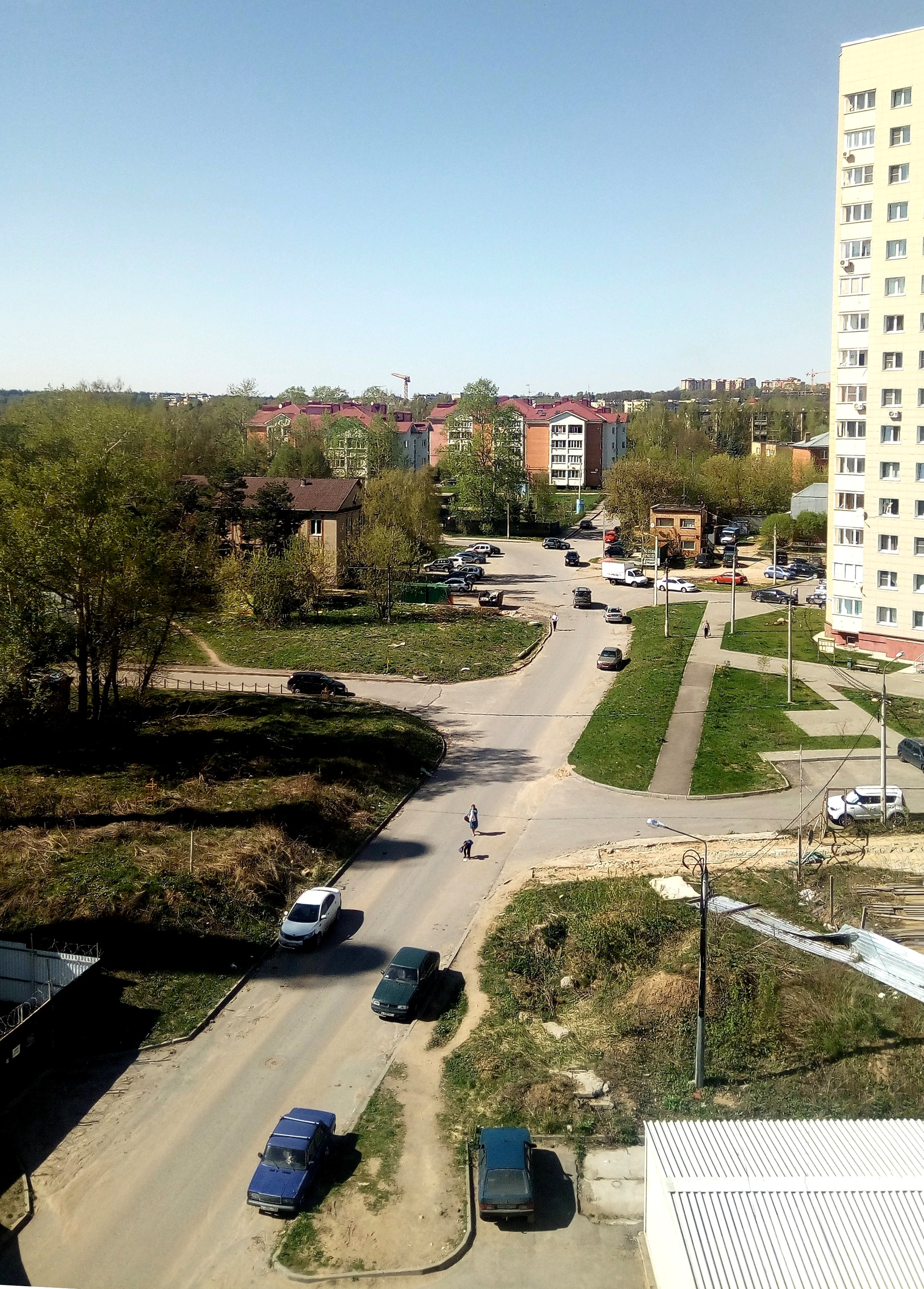 Проезд в микрорайоне Восточный (Звенигород)